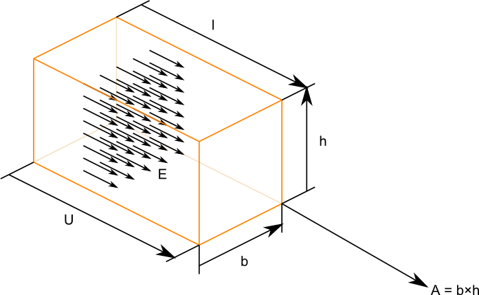 中文（中国大陆）: 欧姆定律